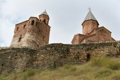 Gremi Kakheti Georgia